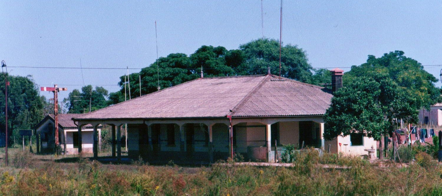 Estación Blanquillo (Uruguay)